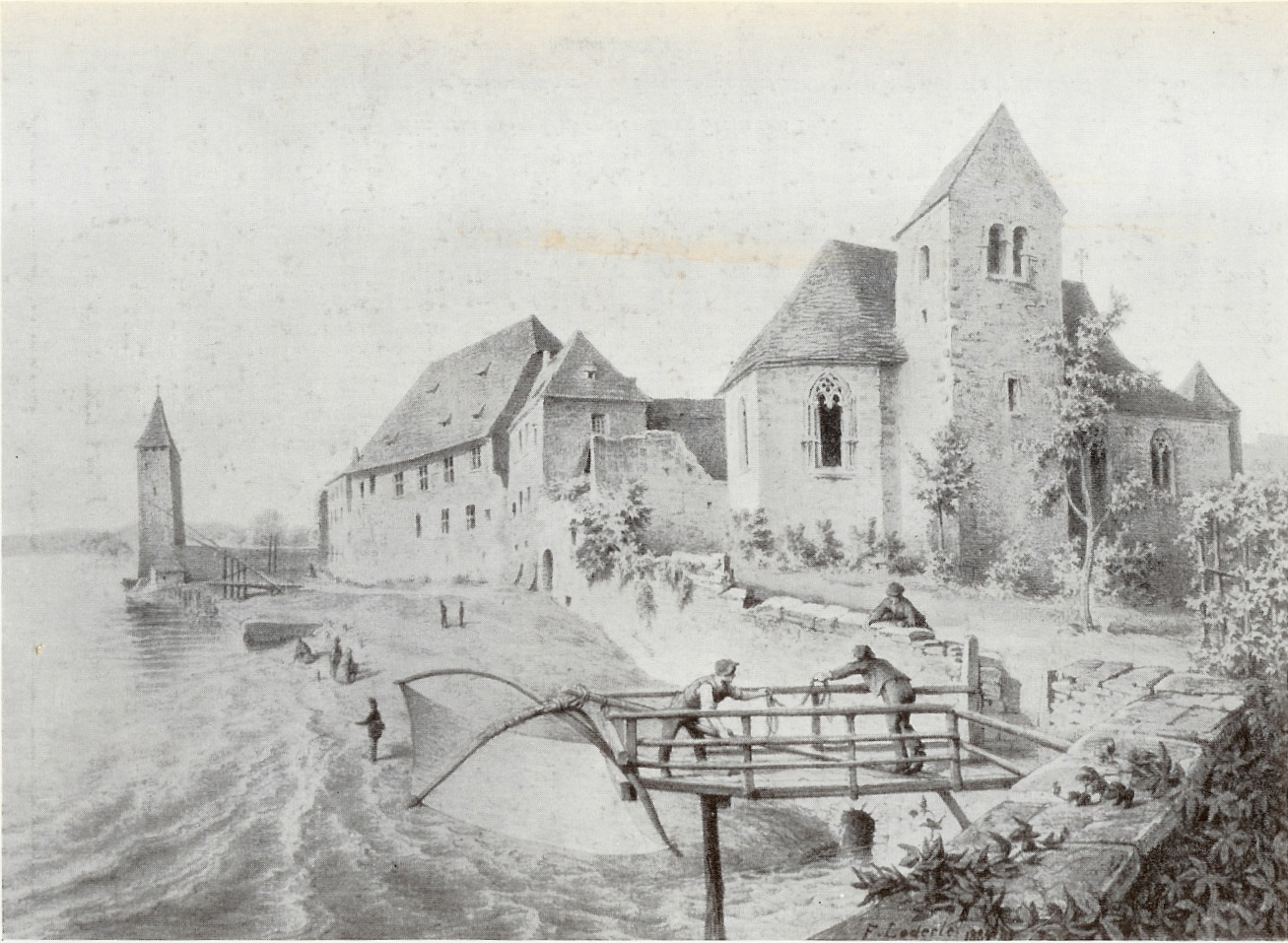 Die Johanniterkommende und links der Messerturm und der Rhein in Rheinfelden